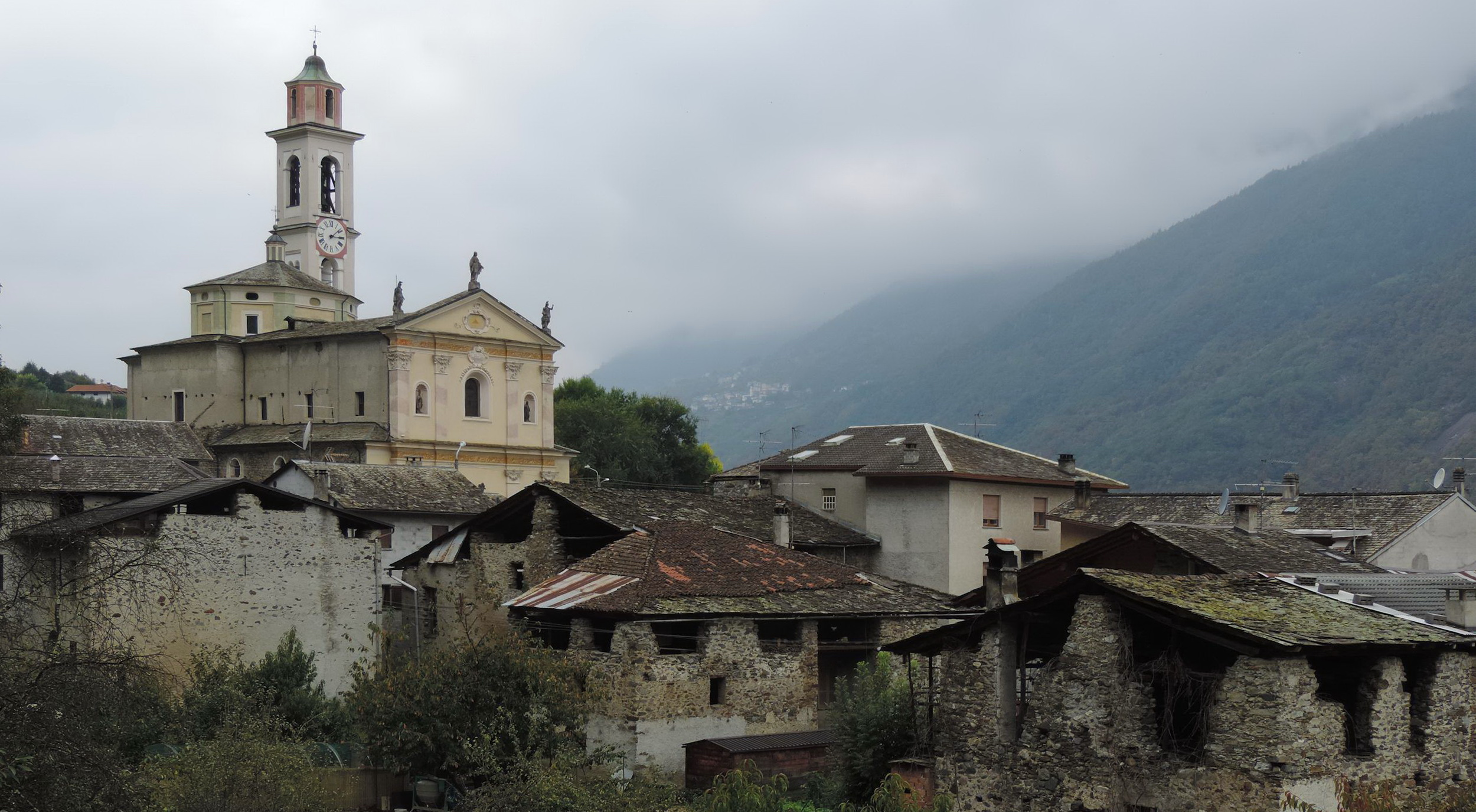 Chiesa di Santa Maria Assunta, Lovero, Italy